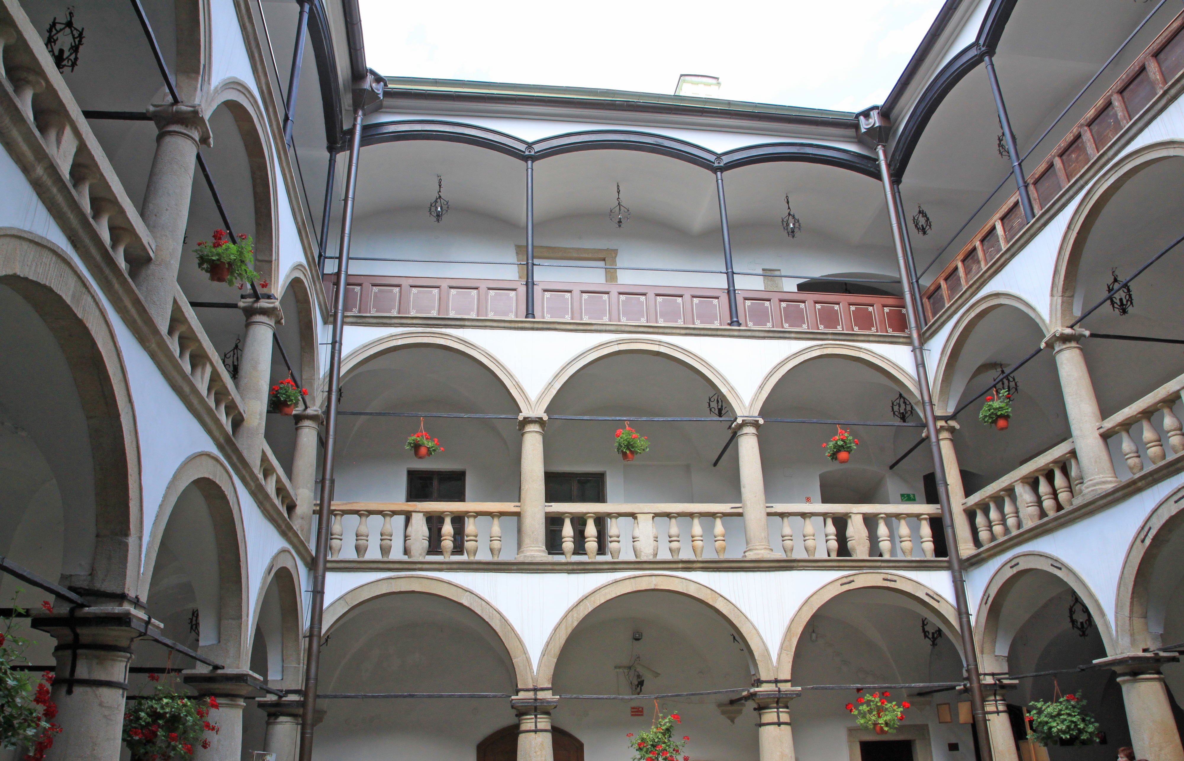 Żywiec, stary zamek, 1500, 1566-69, 1708-1723, 2 poł.XIX